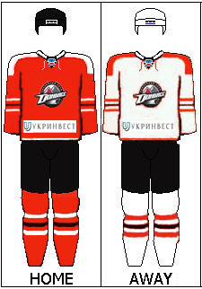 форма хк Донбасс